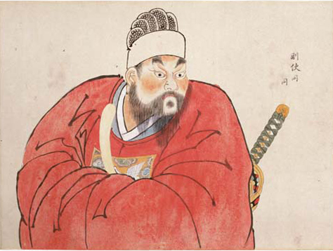 朝鮮通信使人物図（文化8年来聘朝鮮通信使図）中 副使 李勉求の画像(金冠朝服着用)